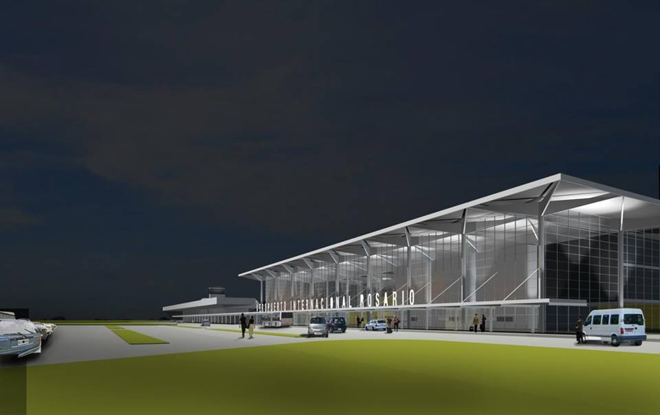 Como se vera el aeropuerto después de la remodelación.